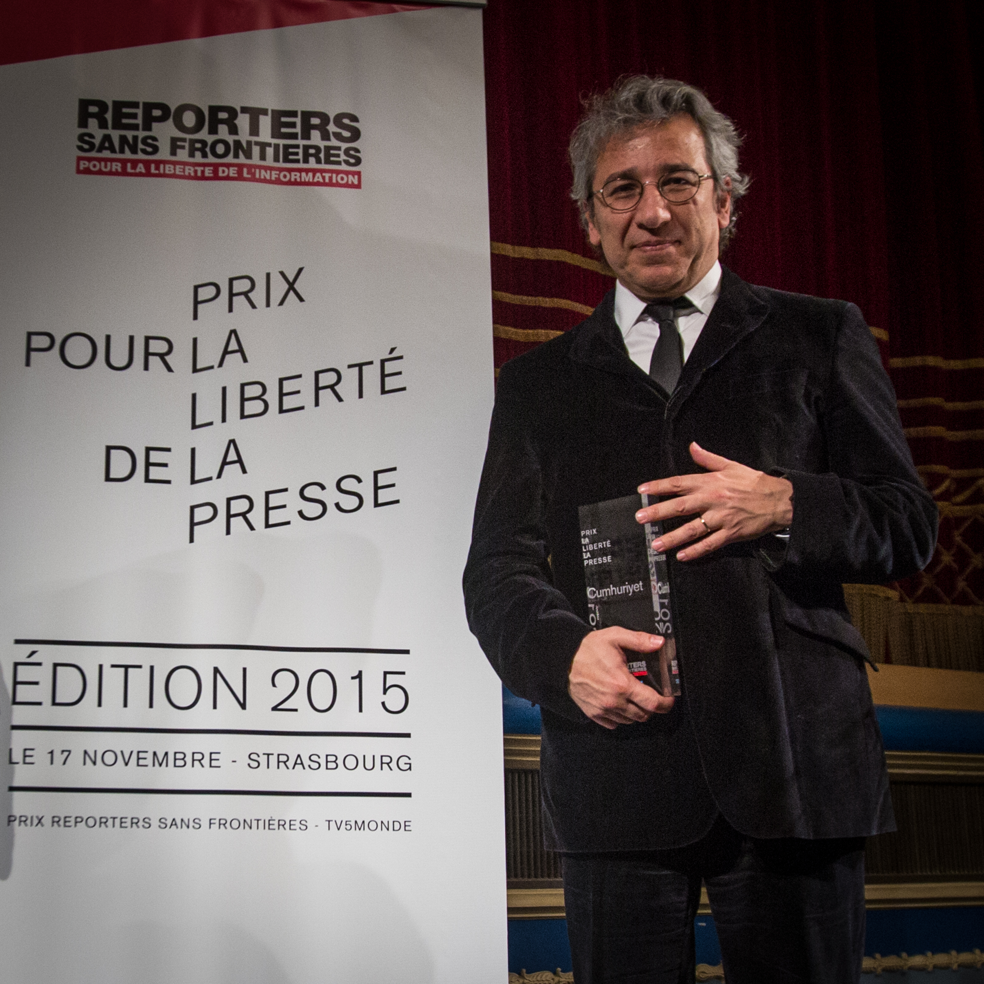 Can Dündar